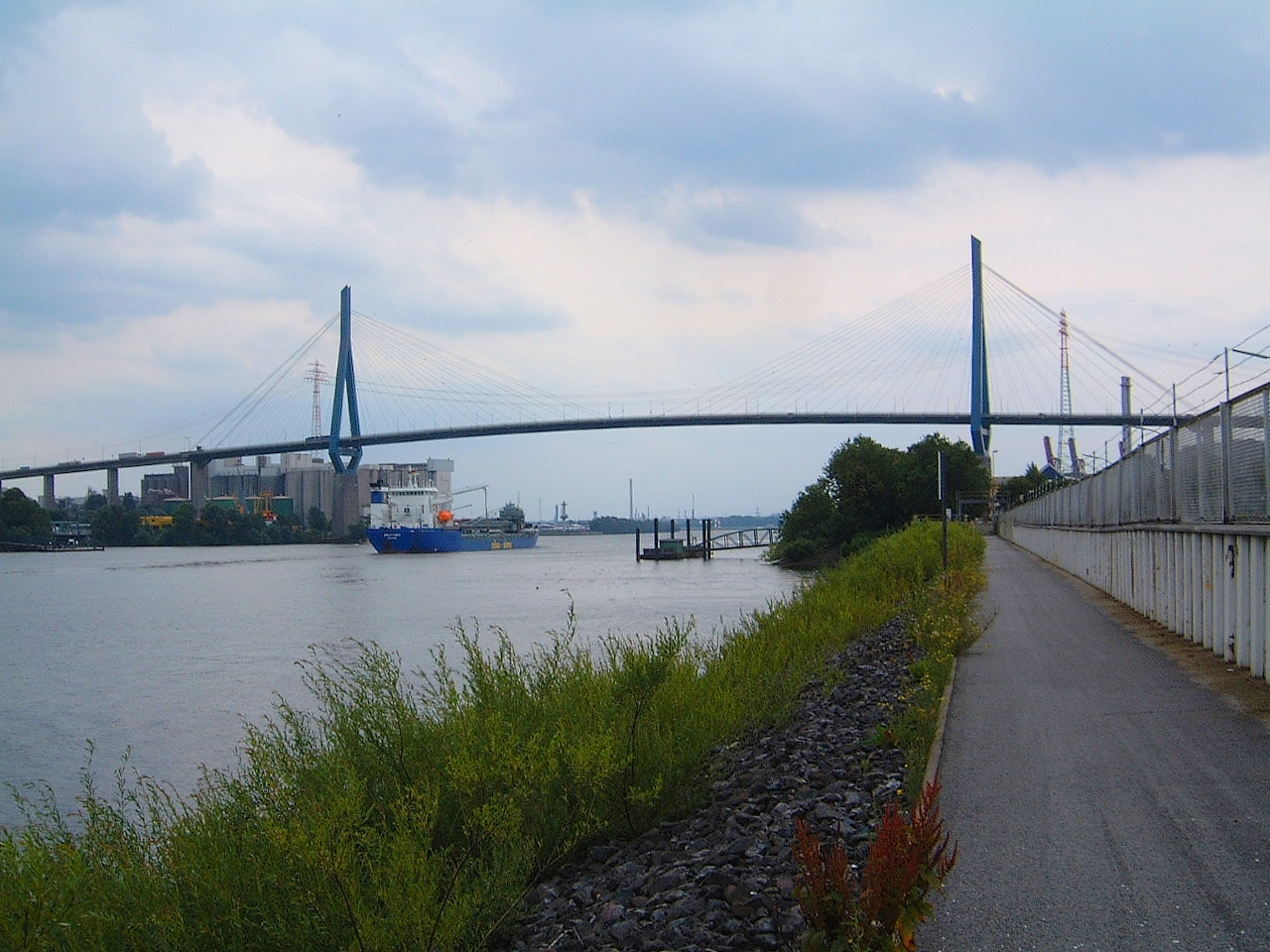 Köhlbrandbrücke Hamburg, 14.7.04. Blick von Waltershof in Richtung Süden.